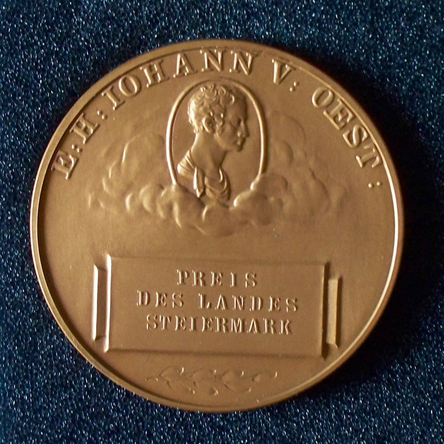 Wartinger Medaille 2007 (averse)